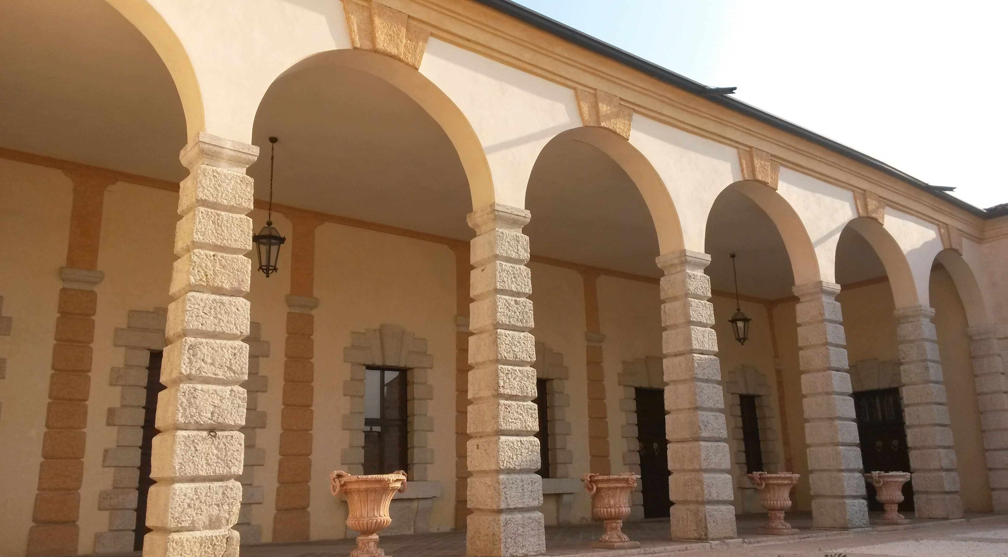 Loggia aperta sulla corte interna, 1580 circa (restaurata nel 2014), scuola di Michele Sanmicheli.